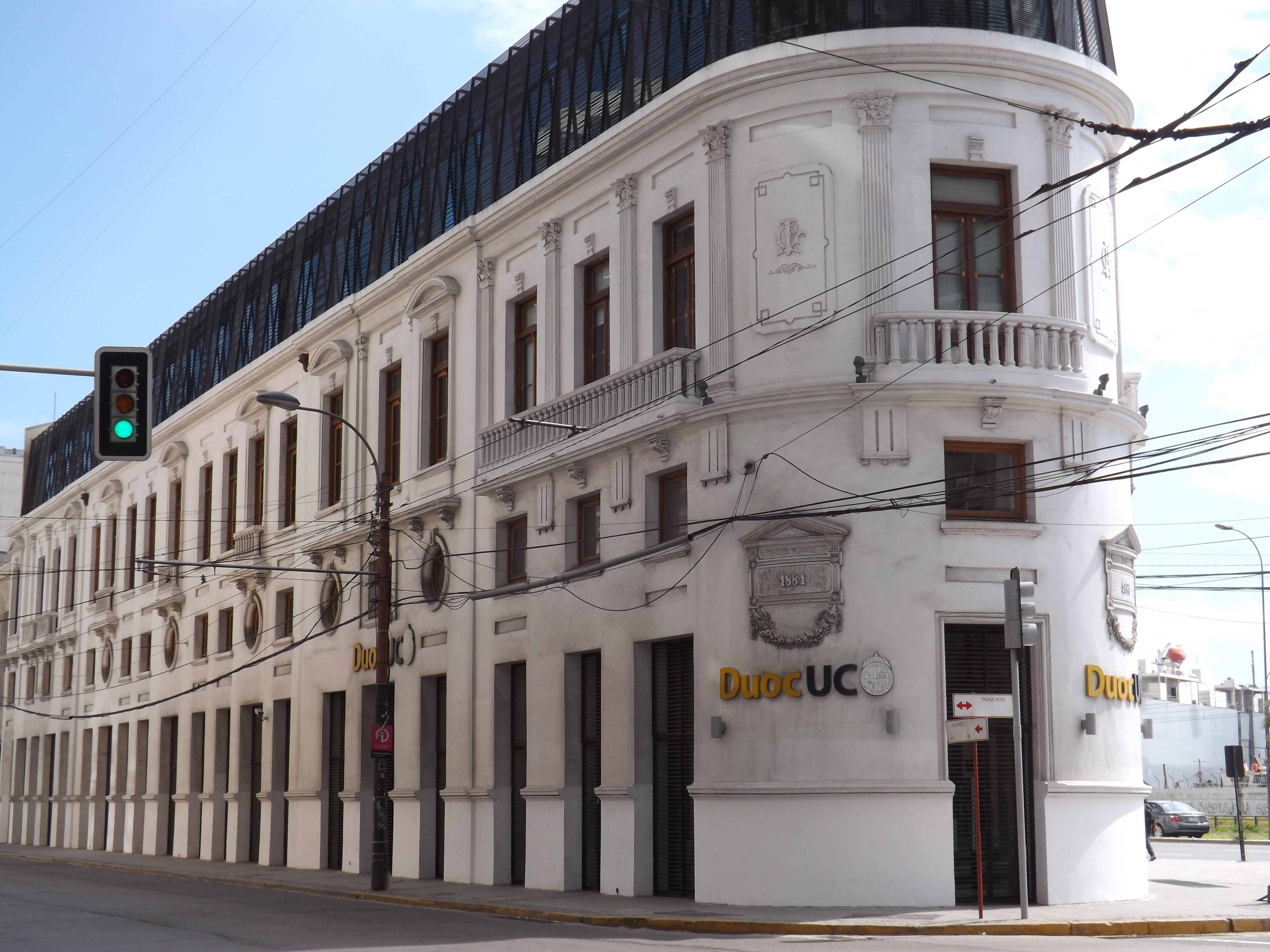 Edificio Luis Cousiño This is a photo of a national monument in Chile: 1561